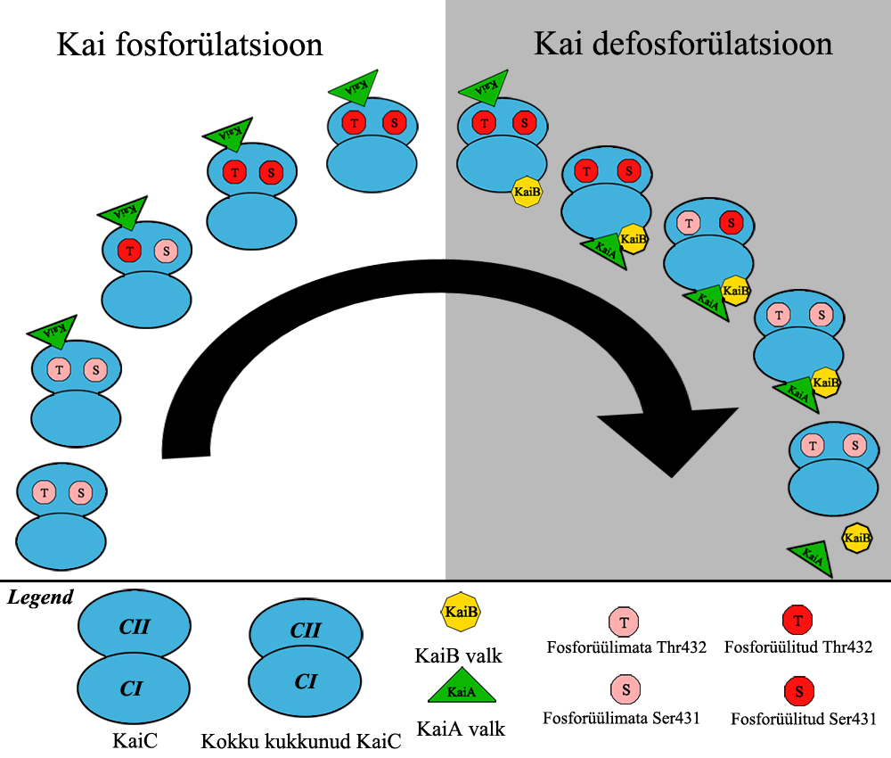 KaiABC autofosforülatsiooni tsükli visuaalne kirjeldus ilma väljundmehhanismita